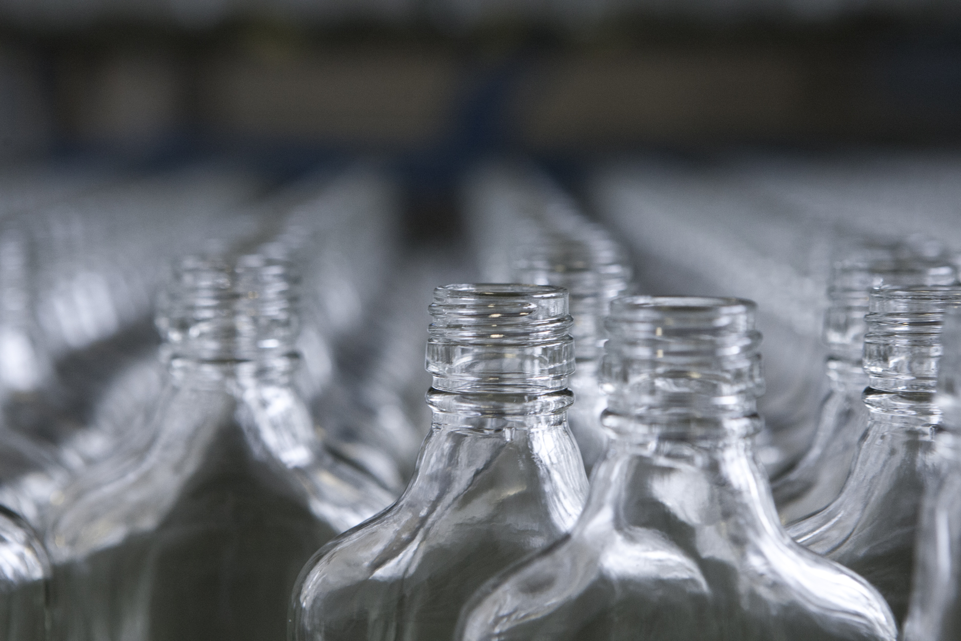 Stumbras Bottling